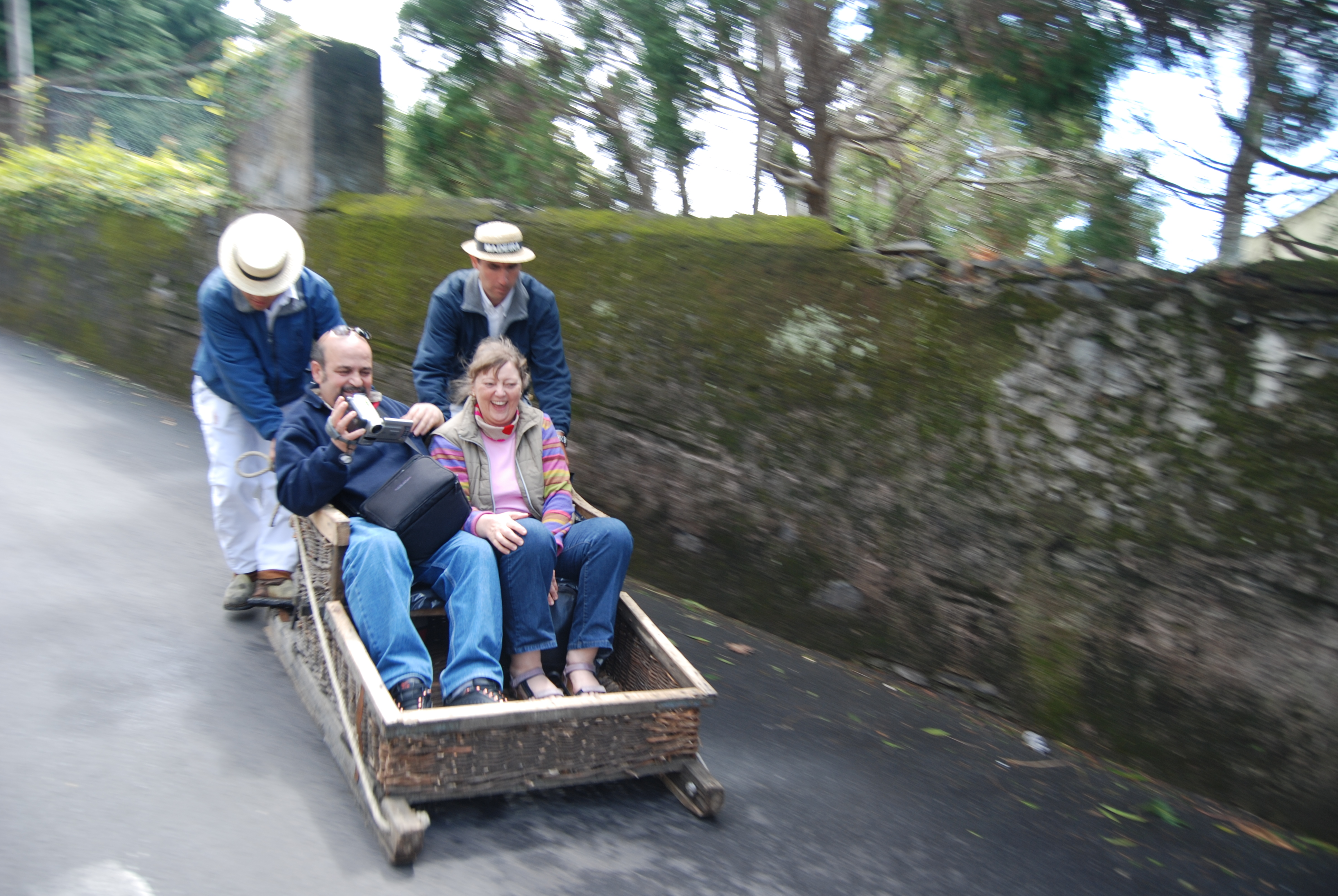 Toboggan riders, Monte, Madeira, Portugal